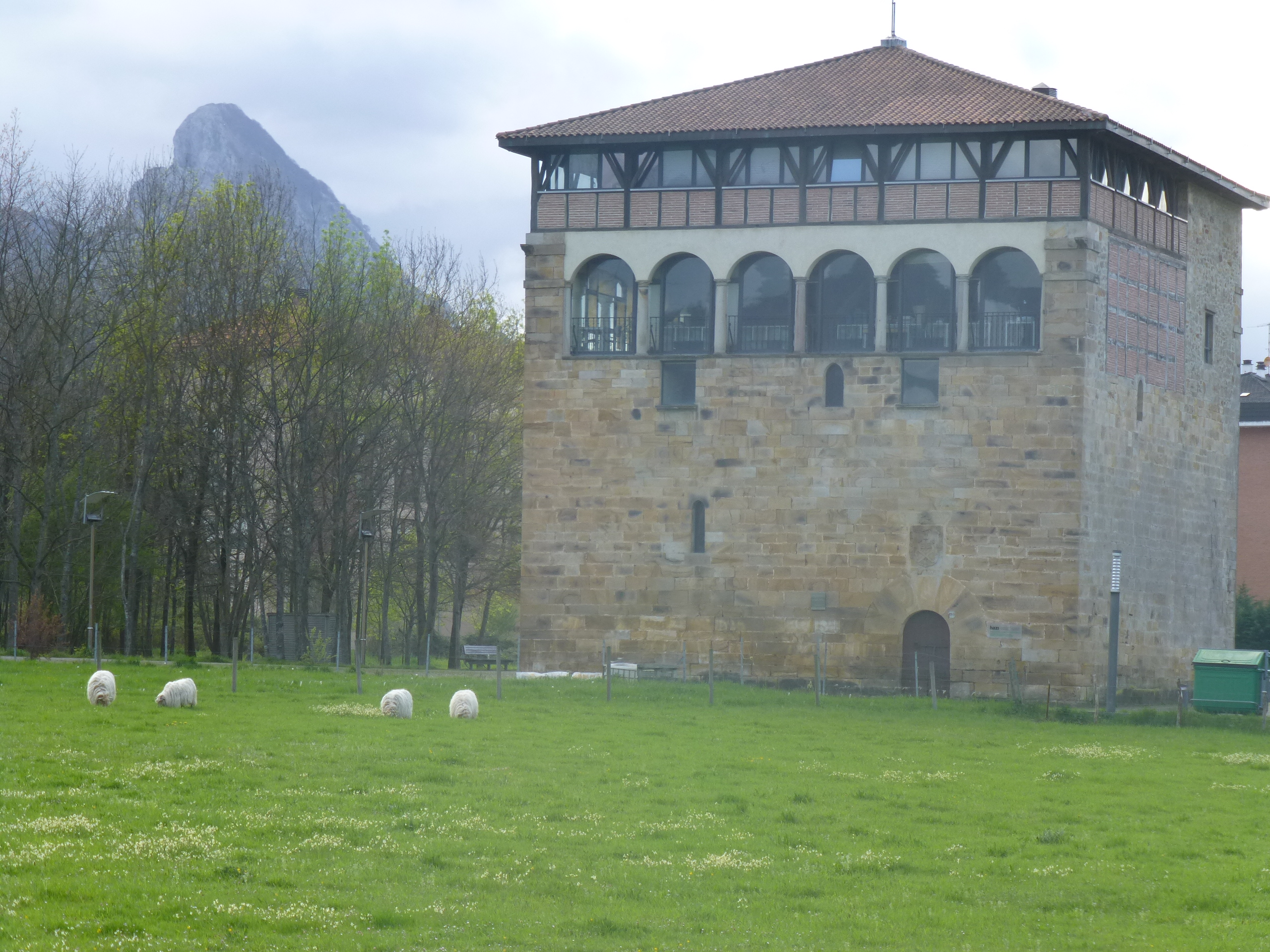 Casa Torre de Mutsaratz del siglo IX. Torre de Mutzaratz en Abadiano , Vizcaya, País Vaco, España.